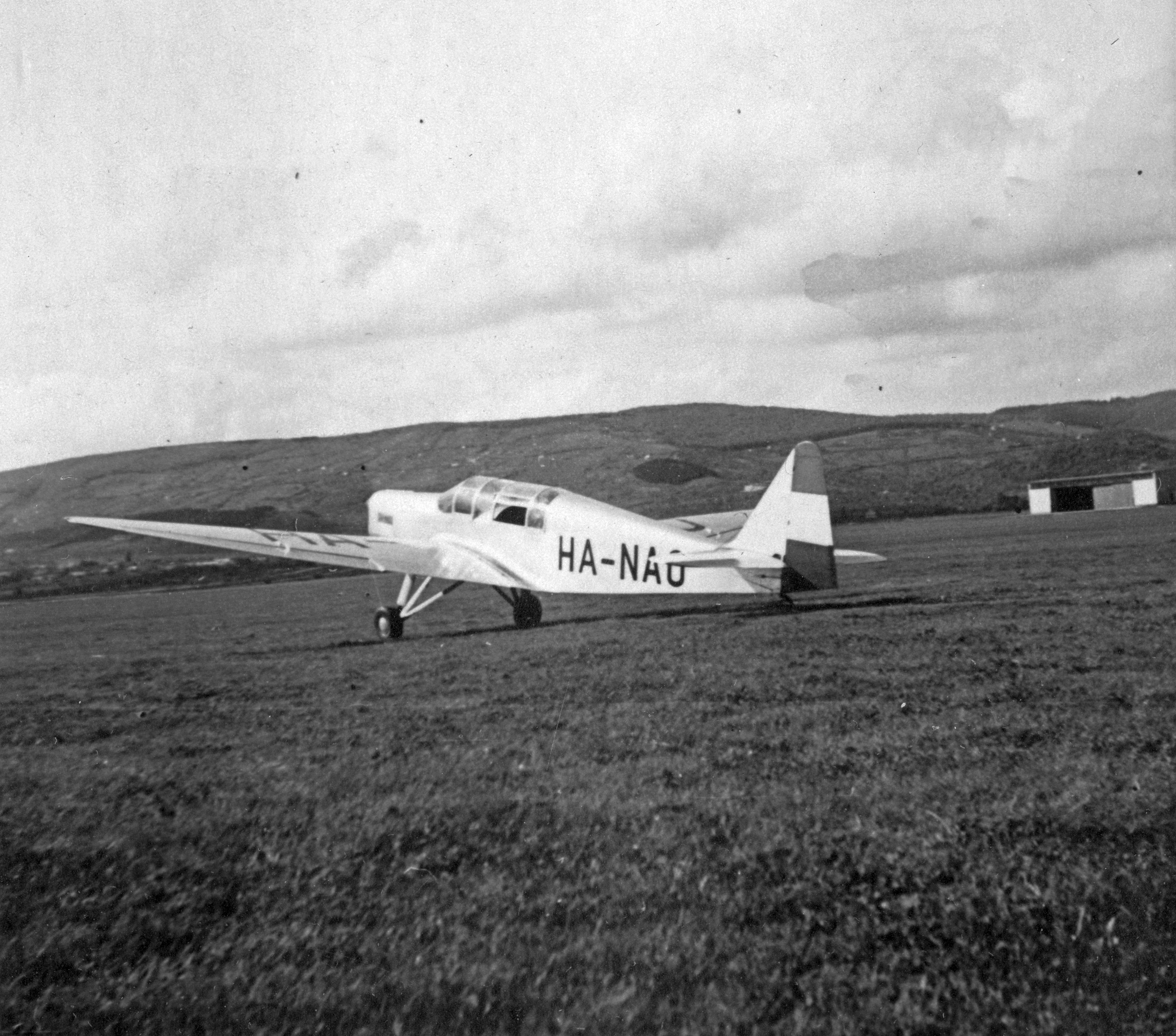 Zlin-212 sport és túra repülőgép. Location: Hungary, Budapest XI., Budaörs Airport Tags: airplane, airport, Zlin-brand, Czechoslovak brand, Budapest Title: Zlin-212 sport és túra repülőgép.